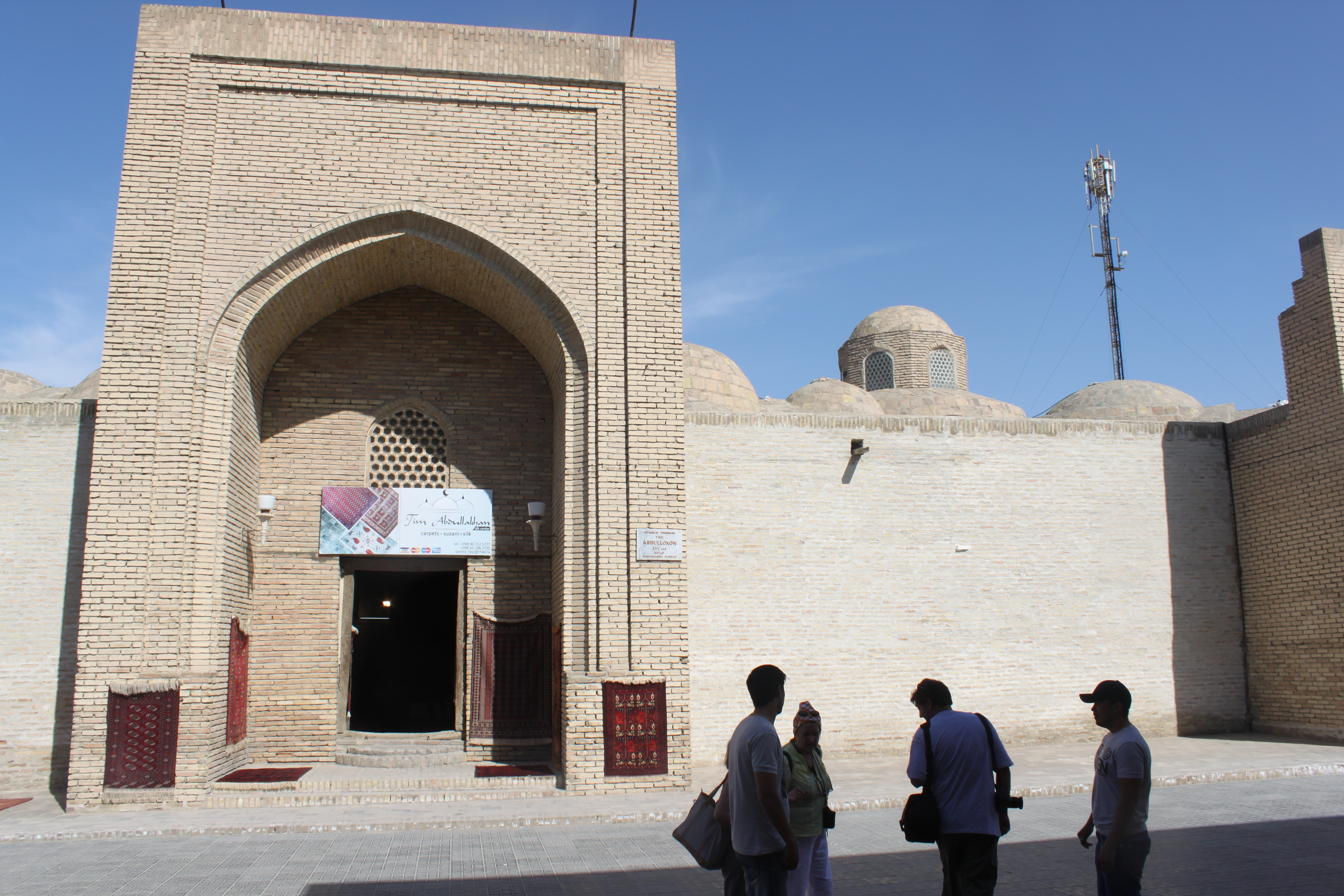 Le tim Abdullah Khan à Boukhara